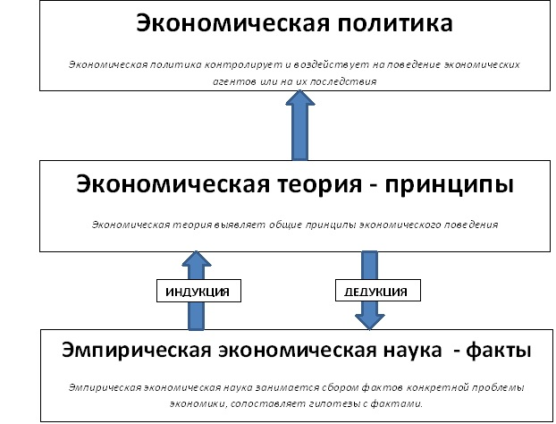 Связь между фактами, принципами и политикой в экономикс